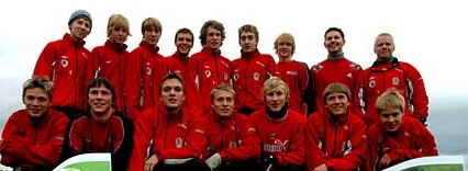 A-Laget til IL Norild